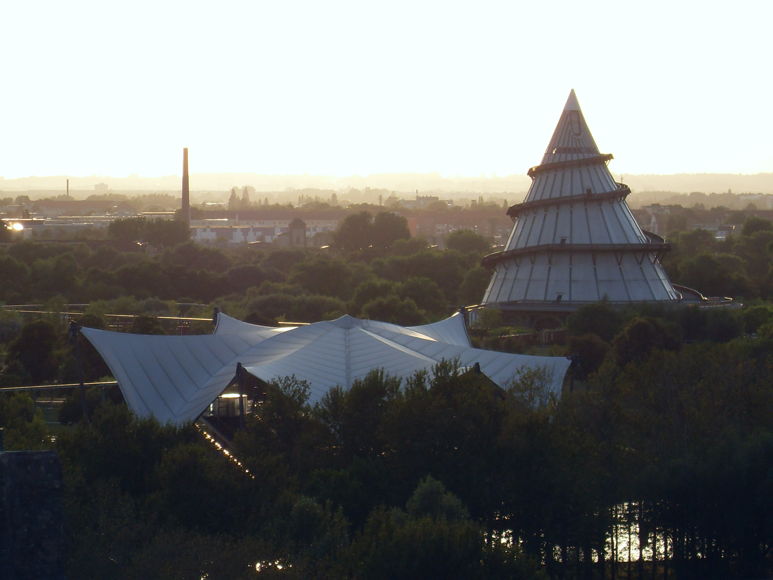 Blick über einen Teil des Elbauenparks